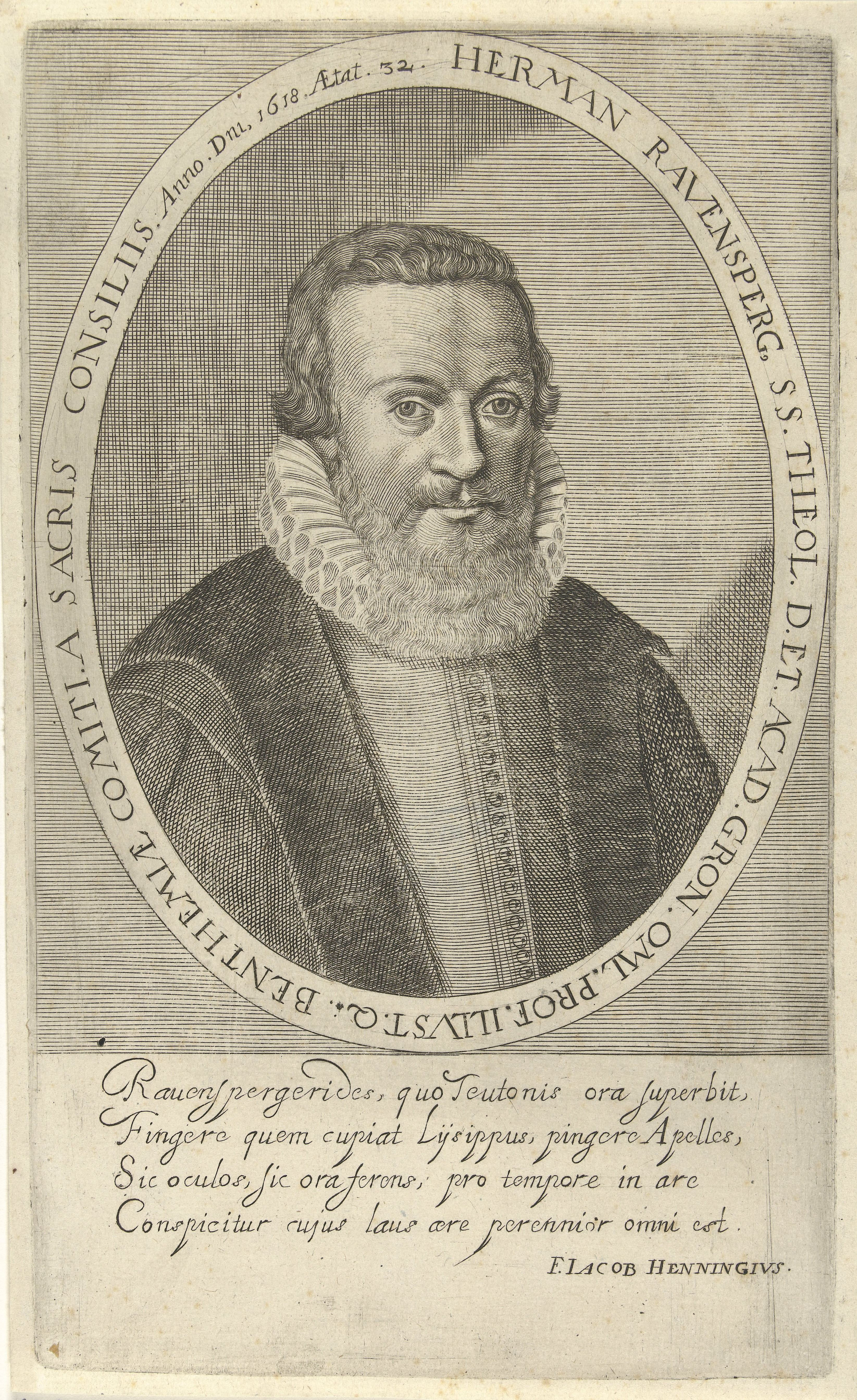 Portretbuste in ovaal naar rechts van Herman Ravensberger, hoogleraar in de theologie te Groningen, blootshoofds. Op de ovale omlijsting staat een randschrift in Latijn, in de marge een vierregelig Latijns vers.